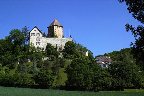 Schaffhausen: Schloss Herblingen (Nr. 03.1-5321)